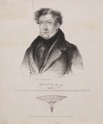 Robert Cocking, englischer Aeronaut